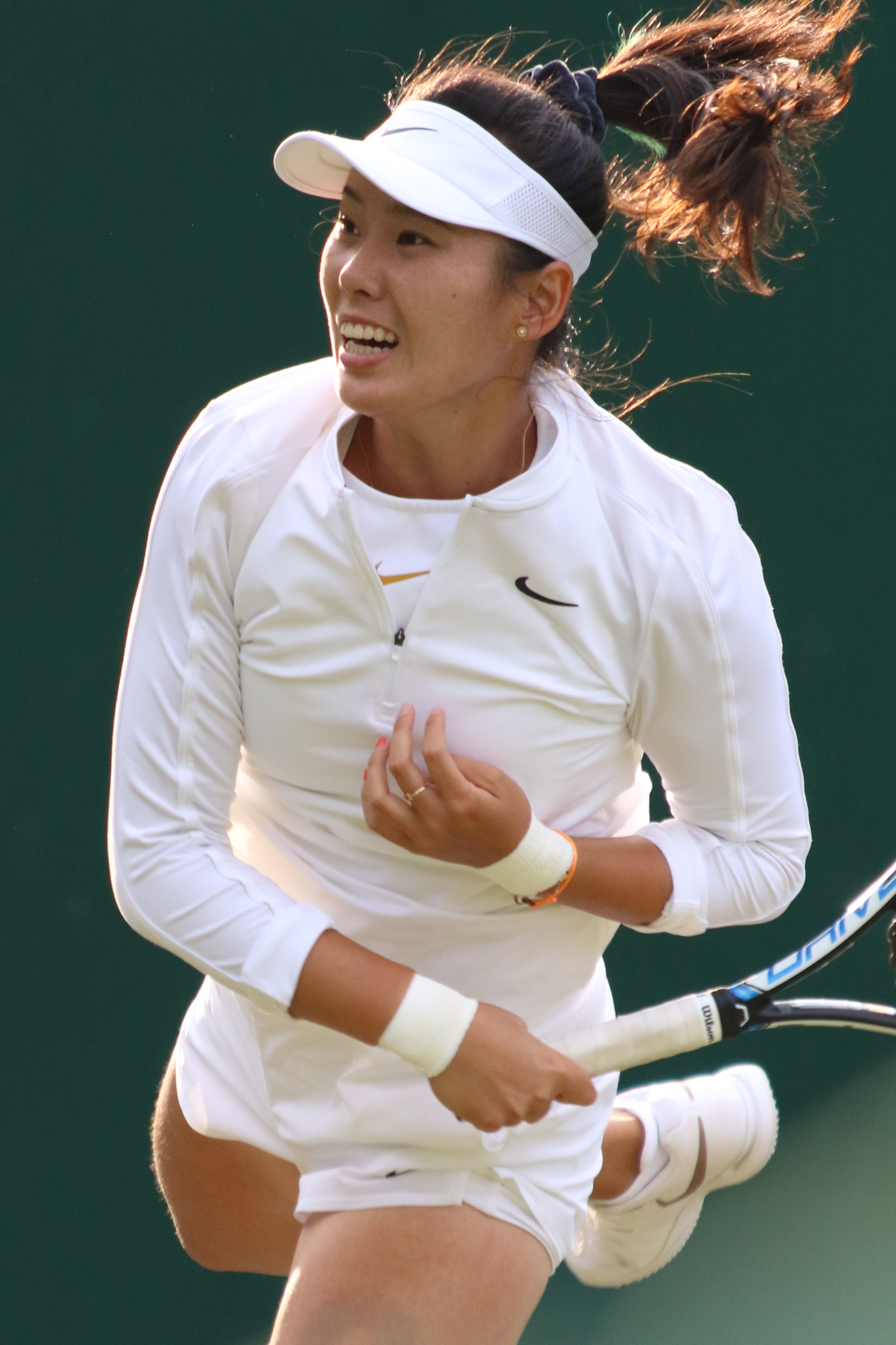 Yang WM19 (26)